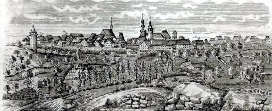 Eine Federzeichnung von Markgröningen von Jakob Gottfried Hegler (1794-1877)[1].